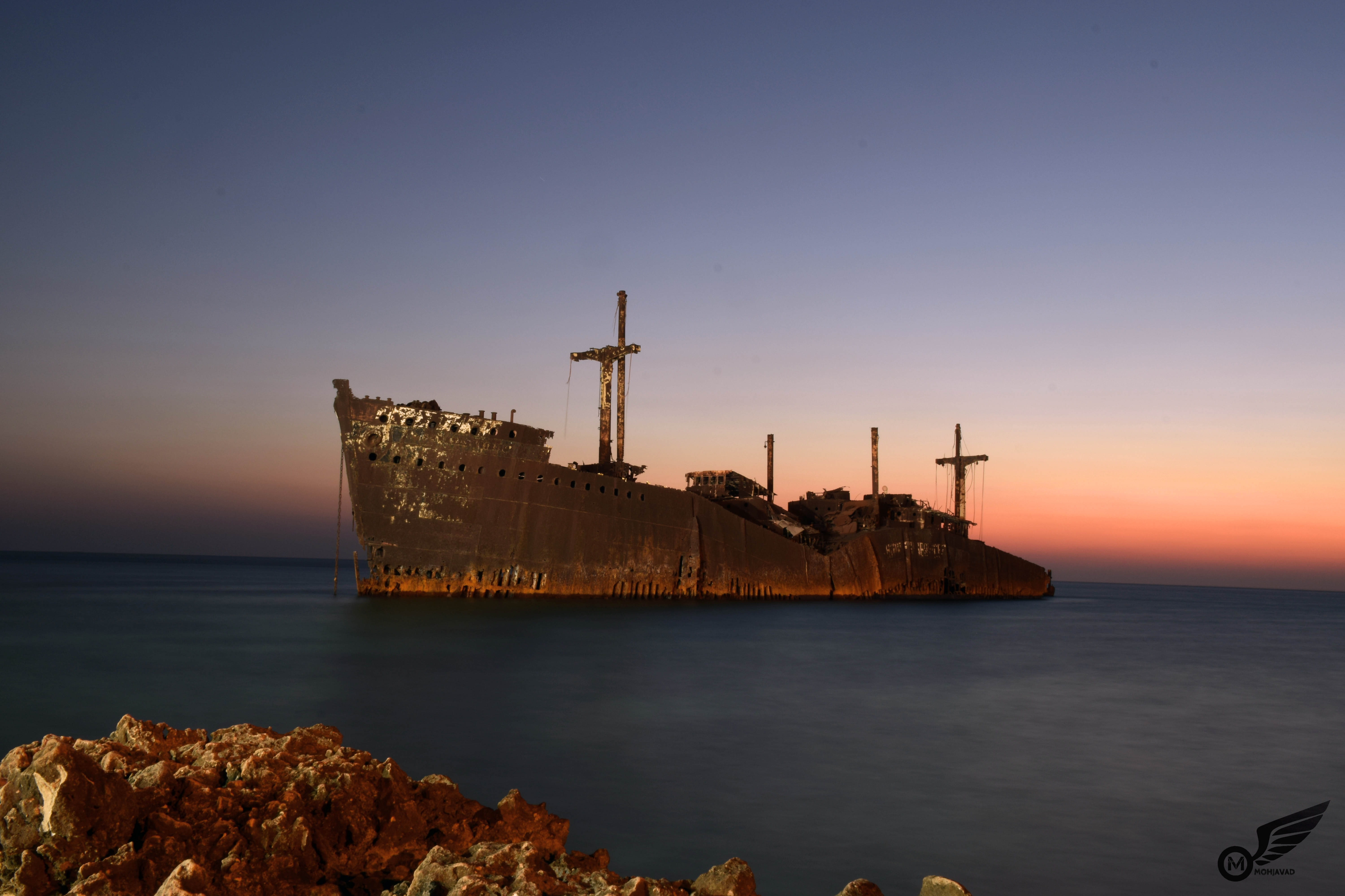 By @Mohjavad